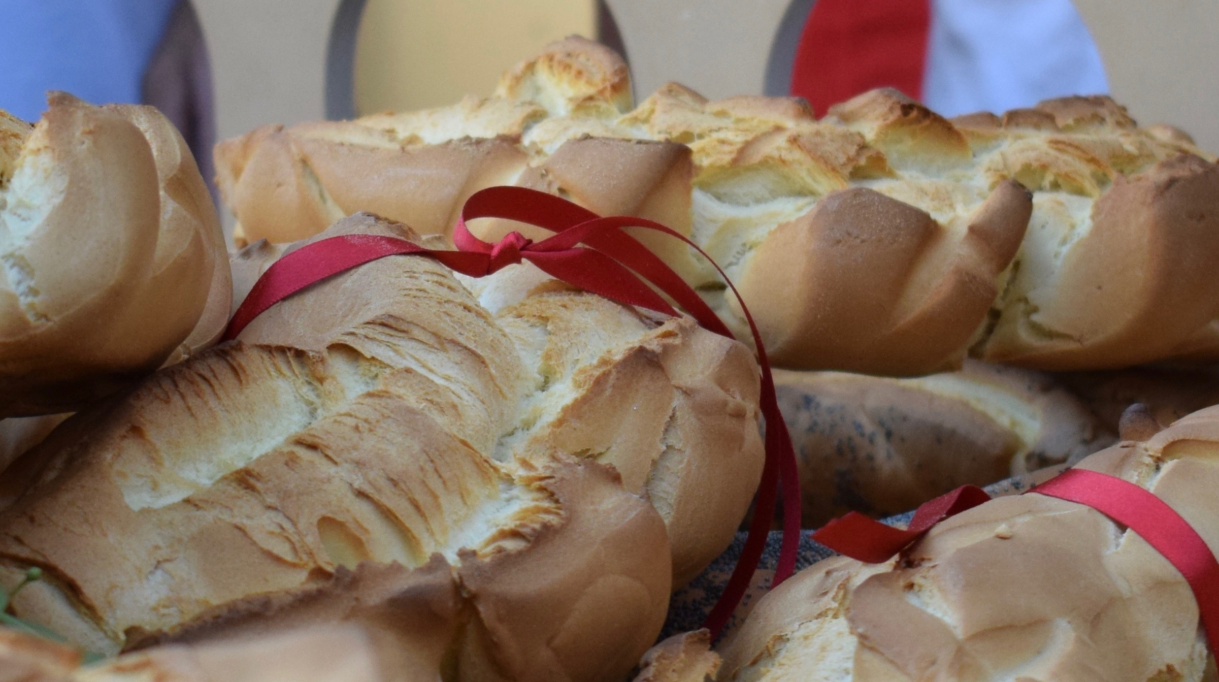 Le tradizionali "cuddure", raccolte e benedette la mattina del 29 giugno